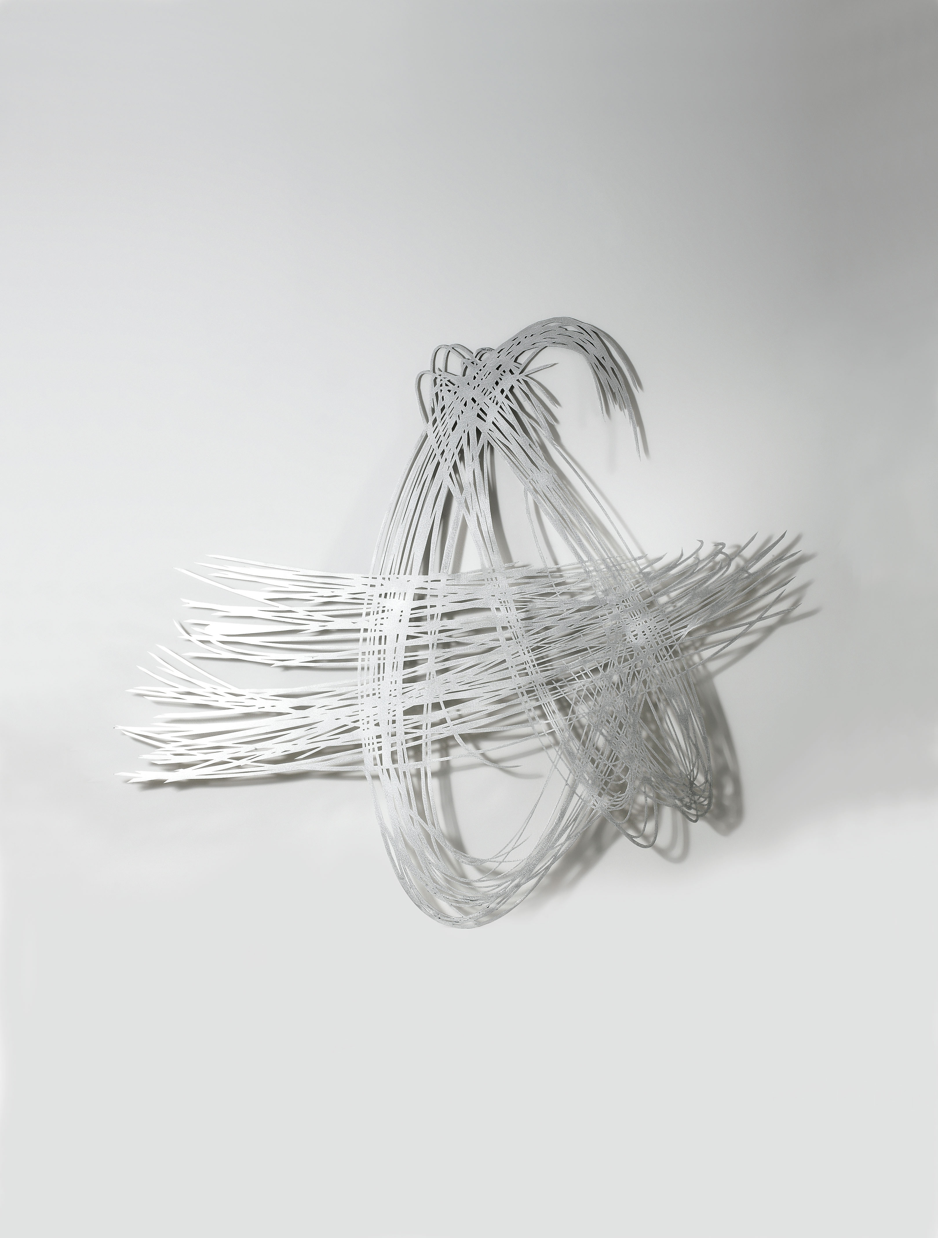 Barbara Szüts, Skulptur "Natur 5", 2007